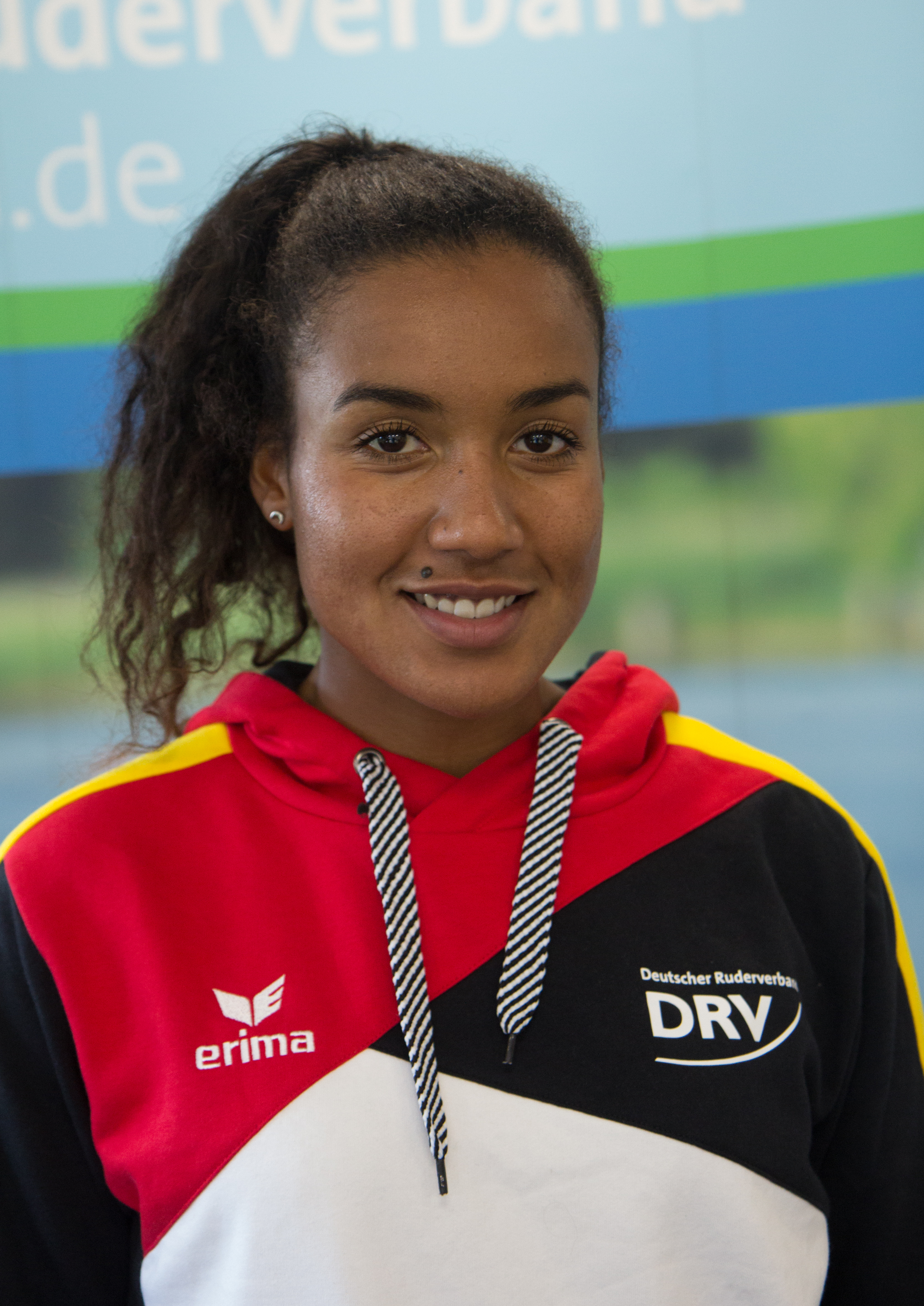 Carlotta Nwajide beim Medientag des Deutschen Ruderverbandes am 6. September 2017 in der Ruderakademie in Ratzeburg.